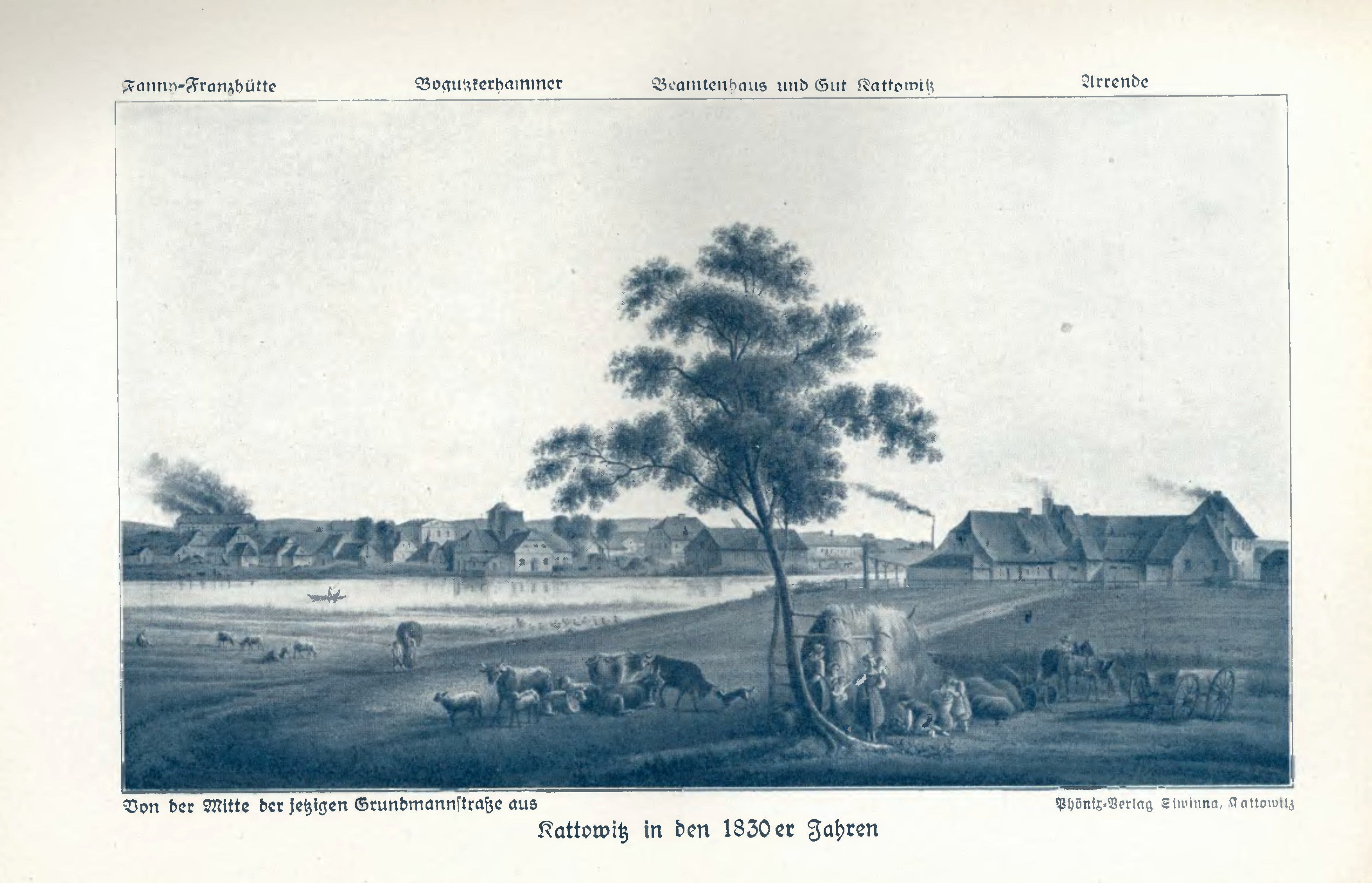 Widok Bogucic w latach 30 XIX wieku.